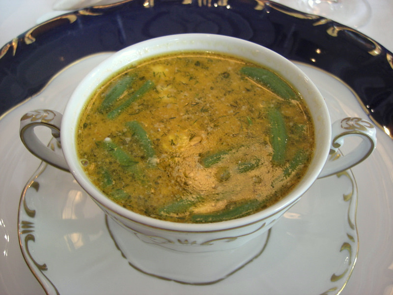 Palóc soup at Gundel Restaurant in Budapest